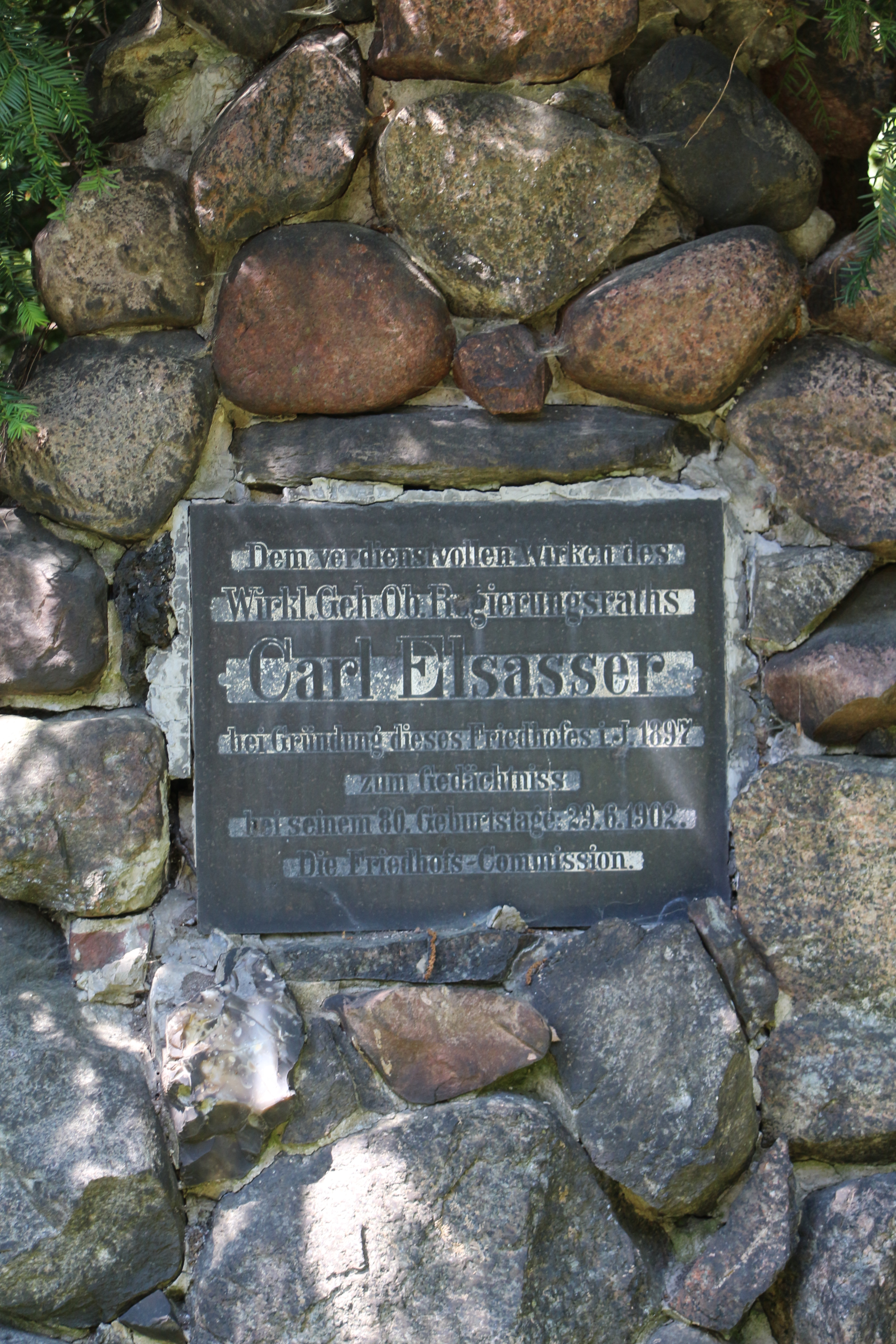 Carl Elsasser (1822–1911) – Gedenkplakette anläßlich seines 80. Geburtstags auf dem St. Simeon und St. Lukas-Friedhof in Berlin-Britz